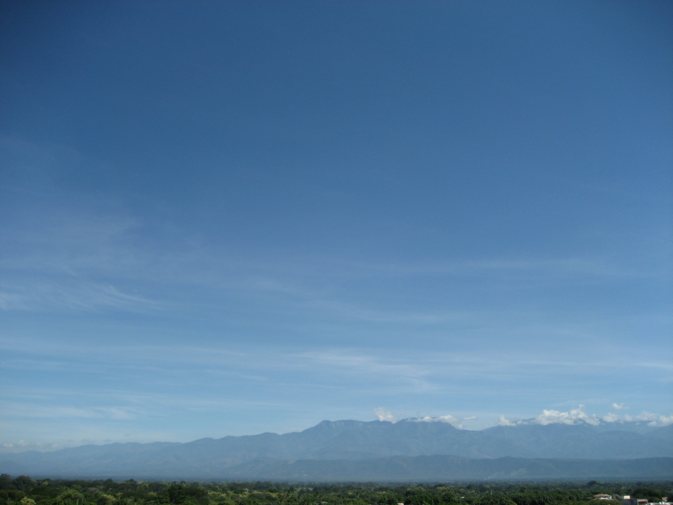 Serrania del Perija, Colombia.